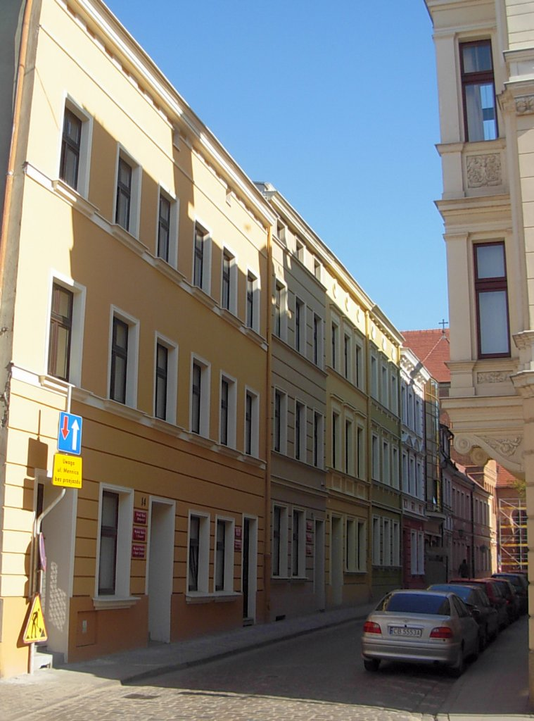 Ulica Jezuicka w Bydgoszczy